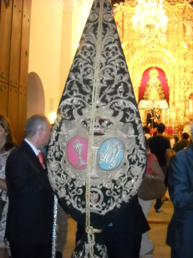 Escudo que aparece en el bacalao de la Hermandad